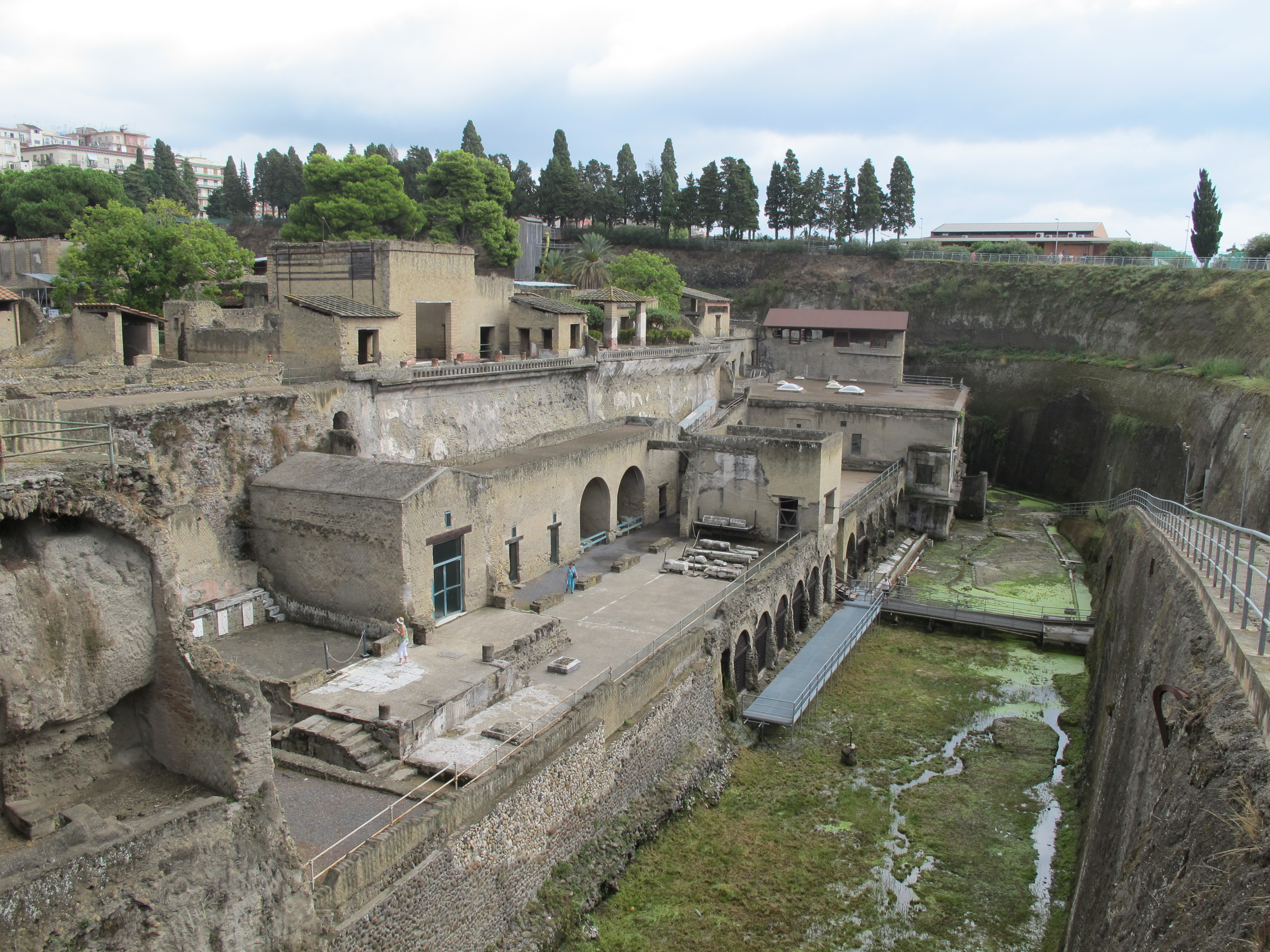 Ercolano